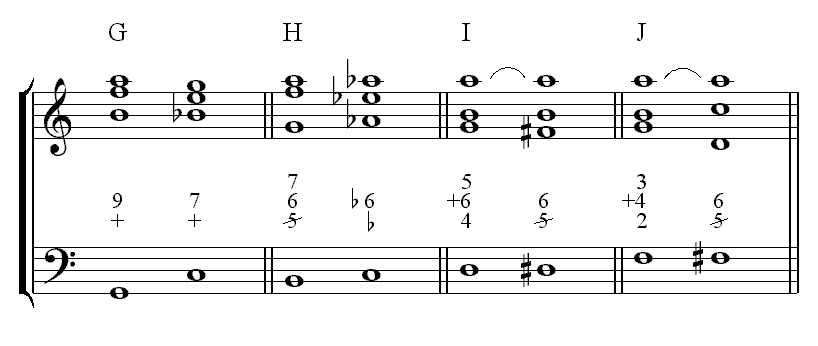 Description : Neuvième majeure de dominante complet - enchaînement exceptionnel Source : Personnelle Licence : GFDL